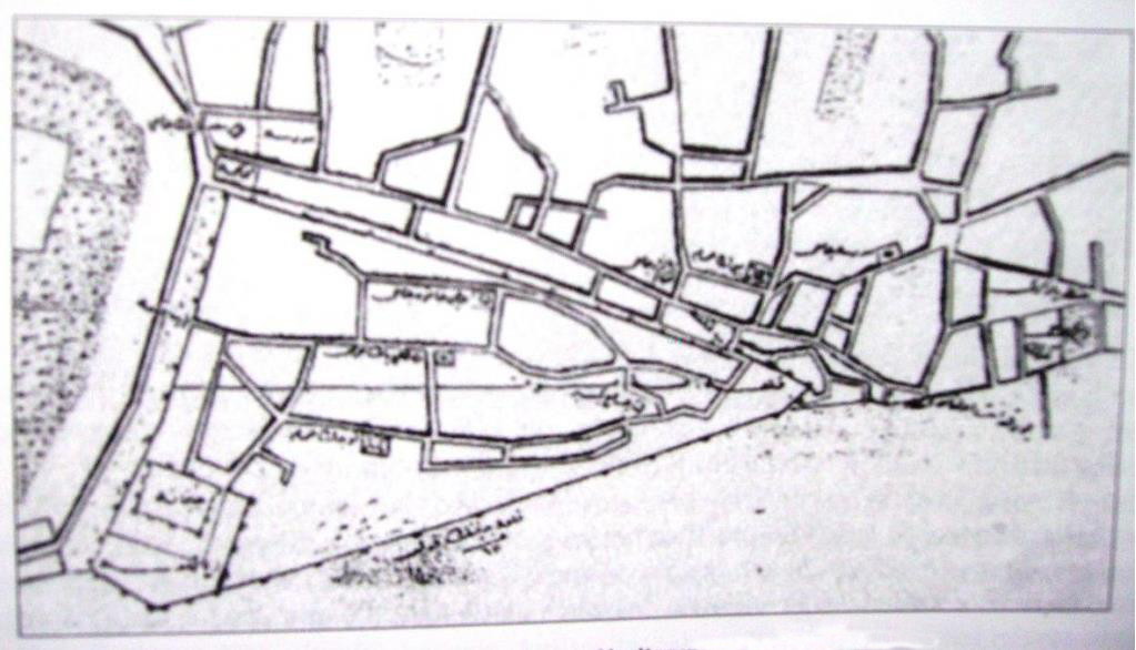 1856 yılına ait Samsun haritasında kale sınırları.